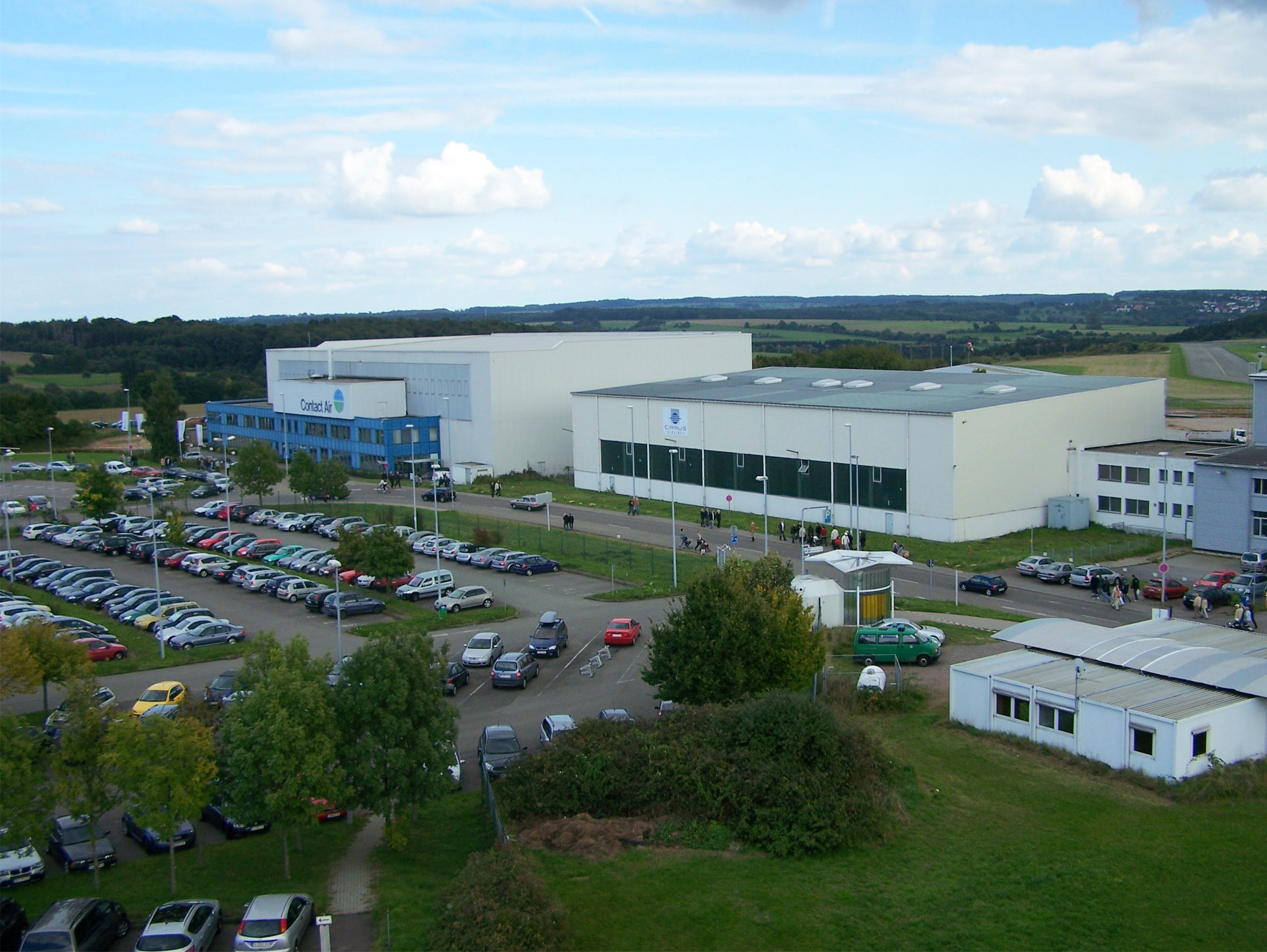 Blick auf die Niederlassungen von Cirrus und ContactAir am Flughafen Saarbrücken